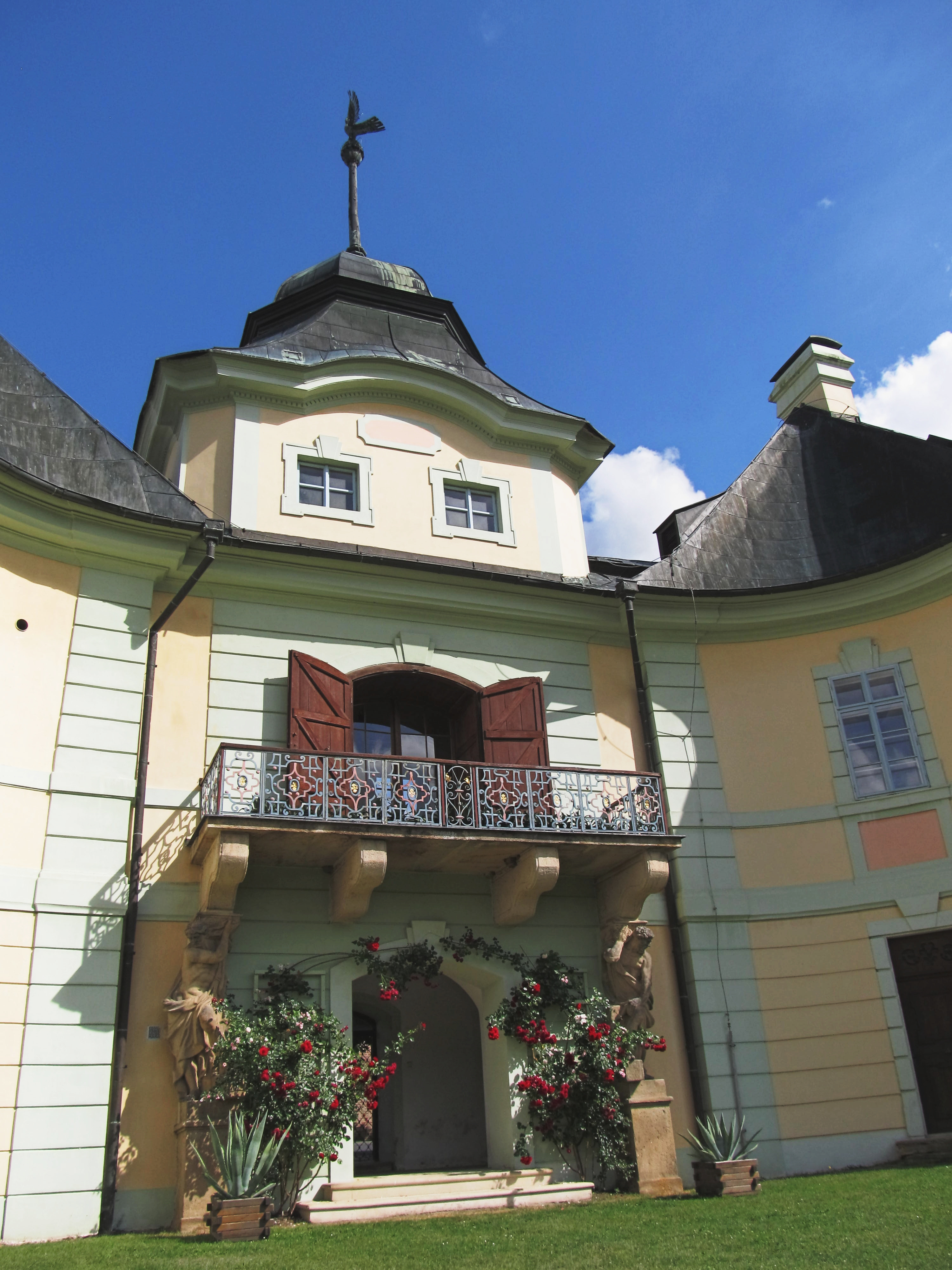 Detail vstupu do jižního průčelí zámku ze zahrady